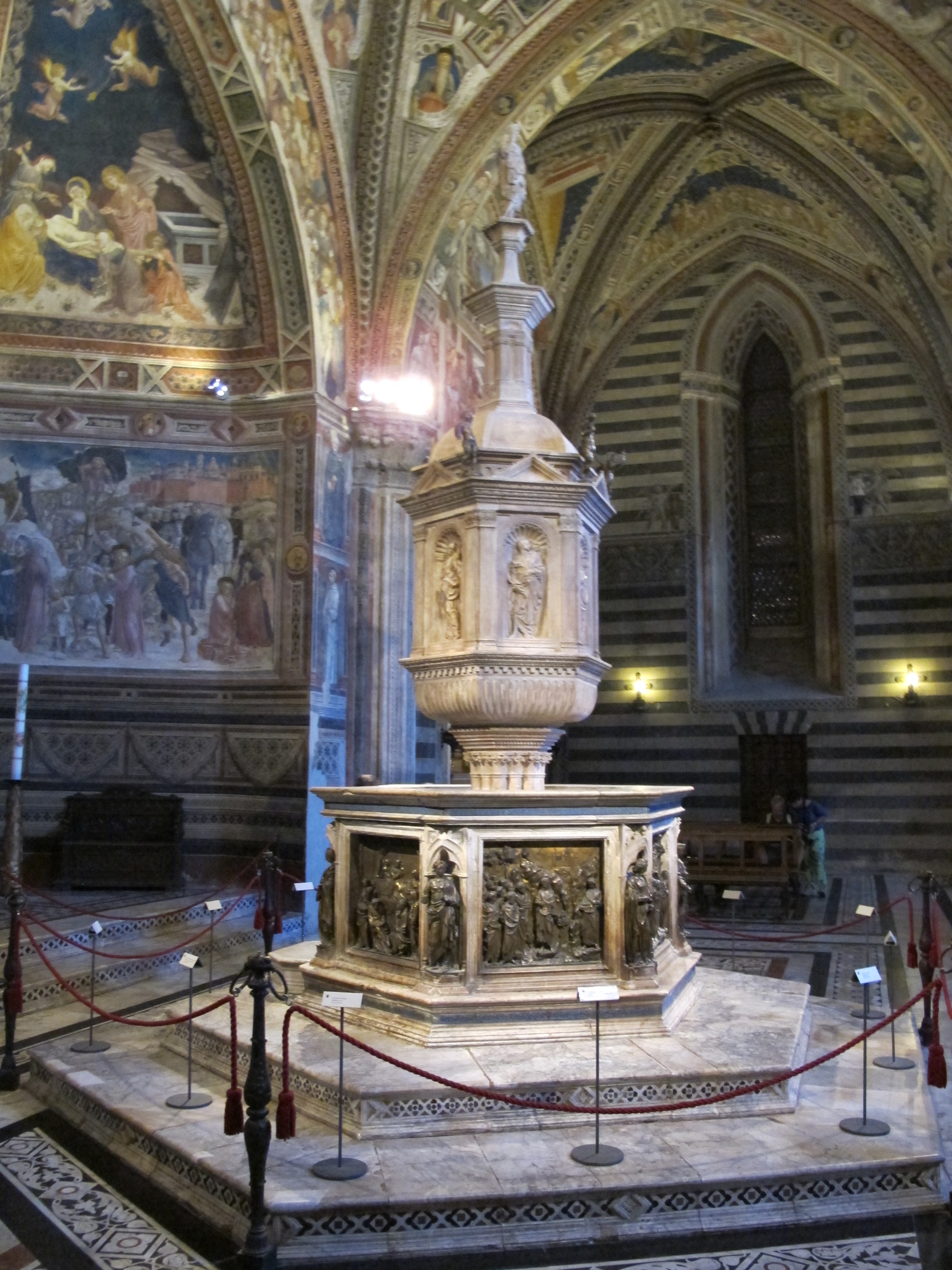 Fonte battesimale di siena, vista